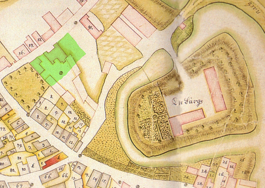 Ortsplan von Pattensen, ungefähre Lage des Weidemannnschen Hofs grün eingefärbt.